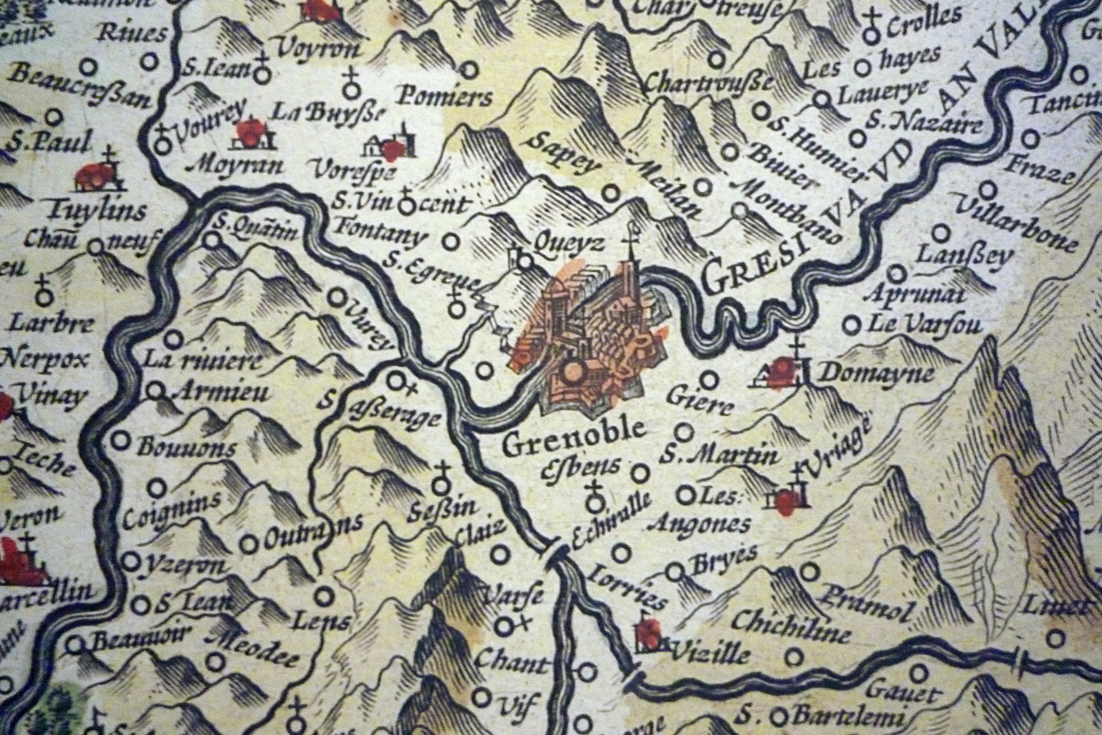 Région de Grenoble en 1622, extrait de carte établie par Jean de Beins. Exposition temporaire au musée de l'Ancien Évêché en 2017.